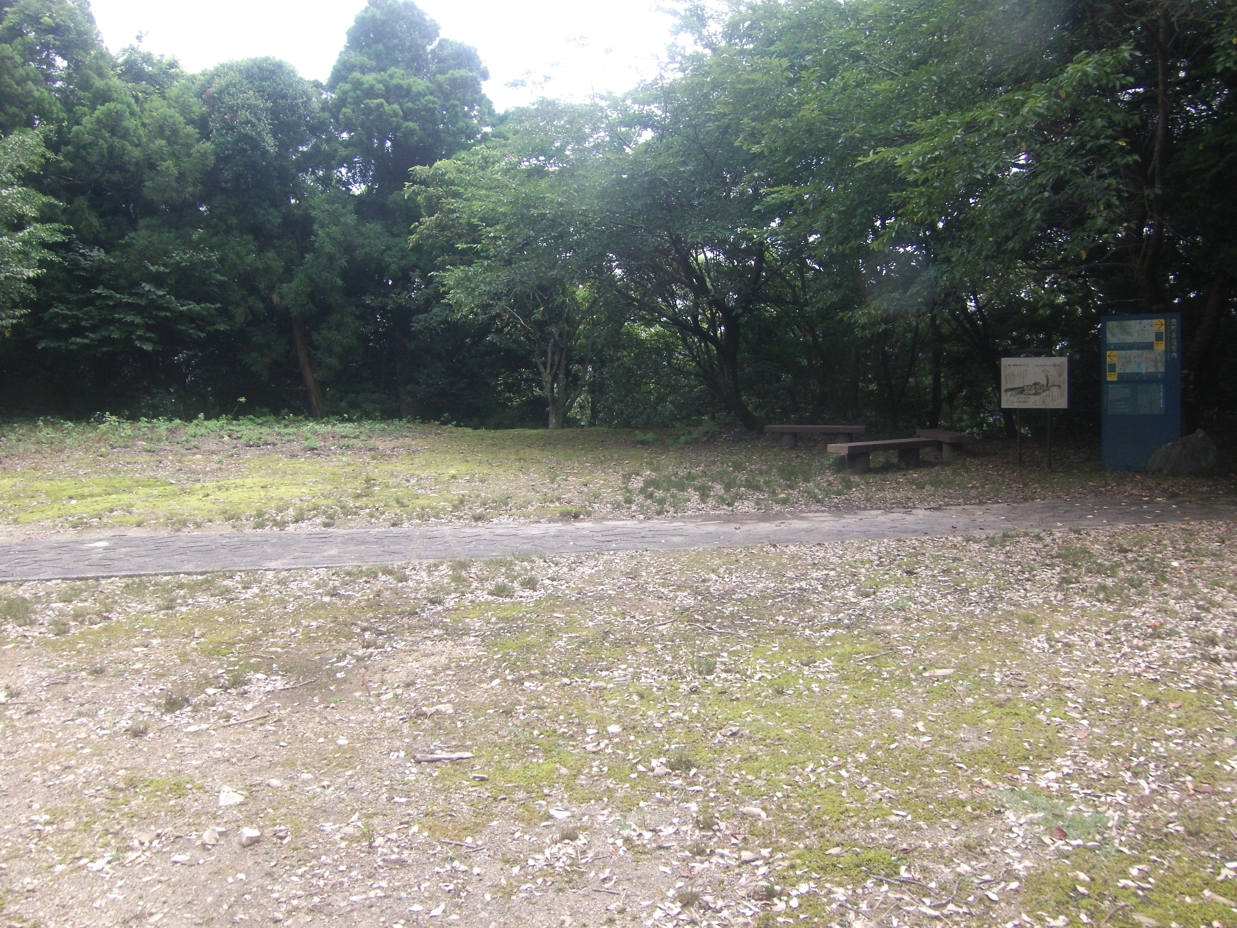 熊野古道・紀伊路の鹿ケ瀬峠